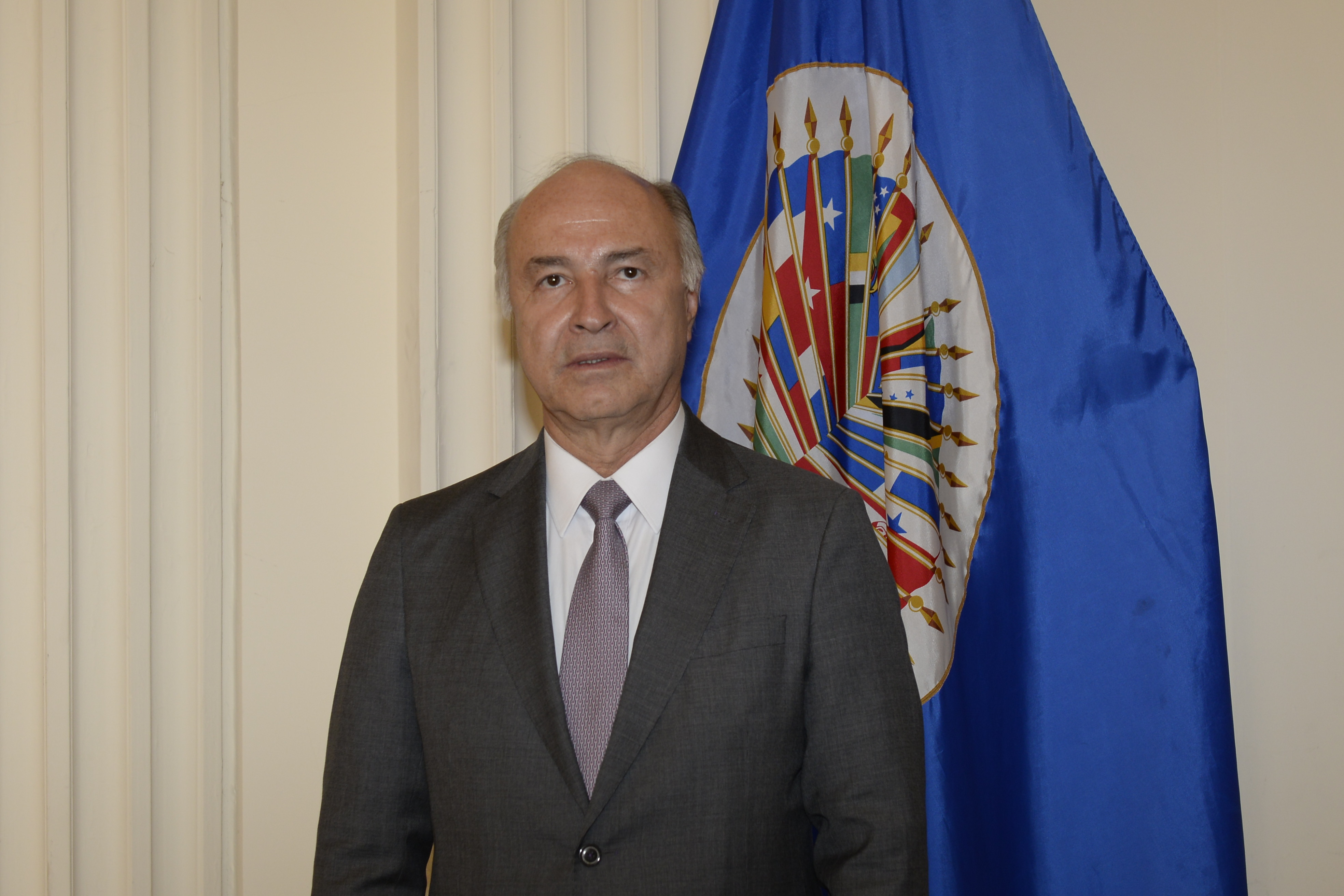 El Comisionado Enrique Gil Botero es ciudadano de Colombia. Fue elegido Comisionado el 16 de junio de 2015 por la Asamblea General de la OEA, para un período de cuatro años que inicia el 1 de enero de 2016 y finaliza el 31 de diciembre de 2019. Es licenciado en Derecho y Ciencias Políticas por la Universidad de Antioquia. Fue Magistrado del Consejo de Estado Colombiano, abogado litigante ante la jurisdicción Contenciosa Administrativa de 1984 al 2006, miembro fundador del Instituto Antioqueño de Responsabilidad Civil y del Estado y Presidente del Consejo de Estado de abril de 2008 a febrero 2009. Comisionado Enrique Gil Botero Relator para Barbados, Chile, Guatemala y Perú Relator sobre los Derechos de los Migrantes Más información: Fecha de la foto: 29 de enero de 2016 Sede de la OEA Juan Manuel Herrera/OEA